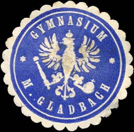 Sealing stamp Title: Gymnasium - M. Gladbach Description: weiß, blau, geprägt Place: München Gladbach size: 4 cm